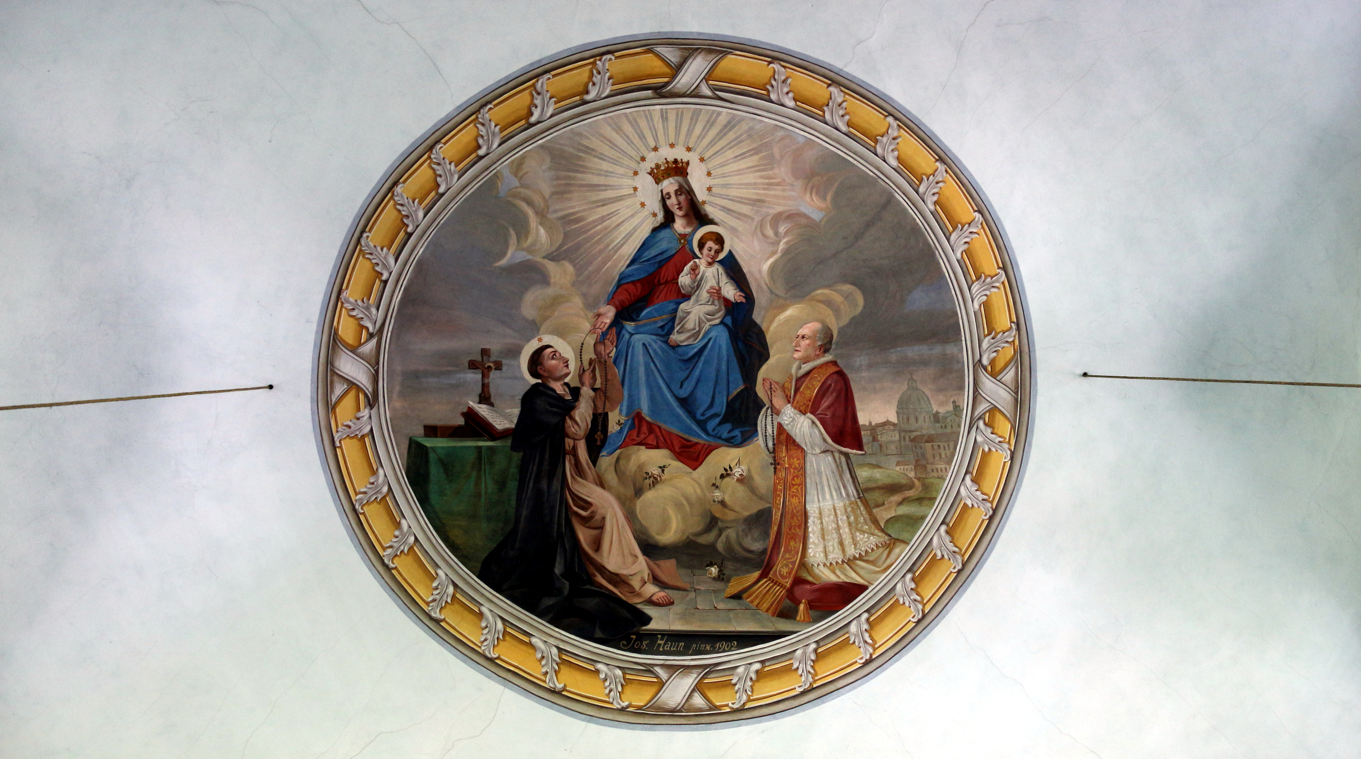 Kath. Pfarrkirche Maria zum Siege in Aschau im Zillertal, Tirol. Deckenfresko von Josef Haun 1902 geschaffen.